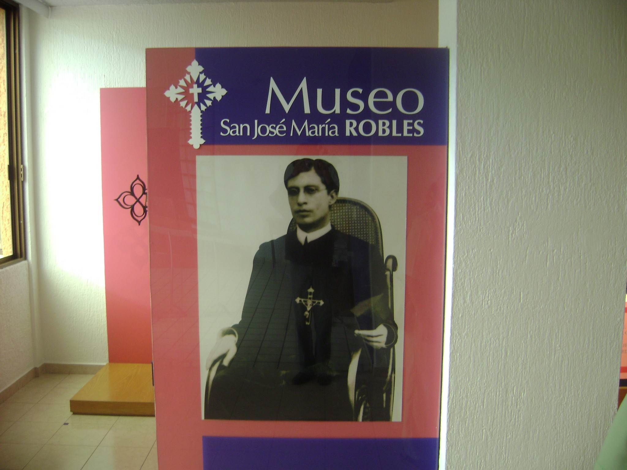 Museo en honor a San Jose Maria Robles Hurtado